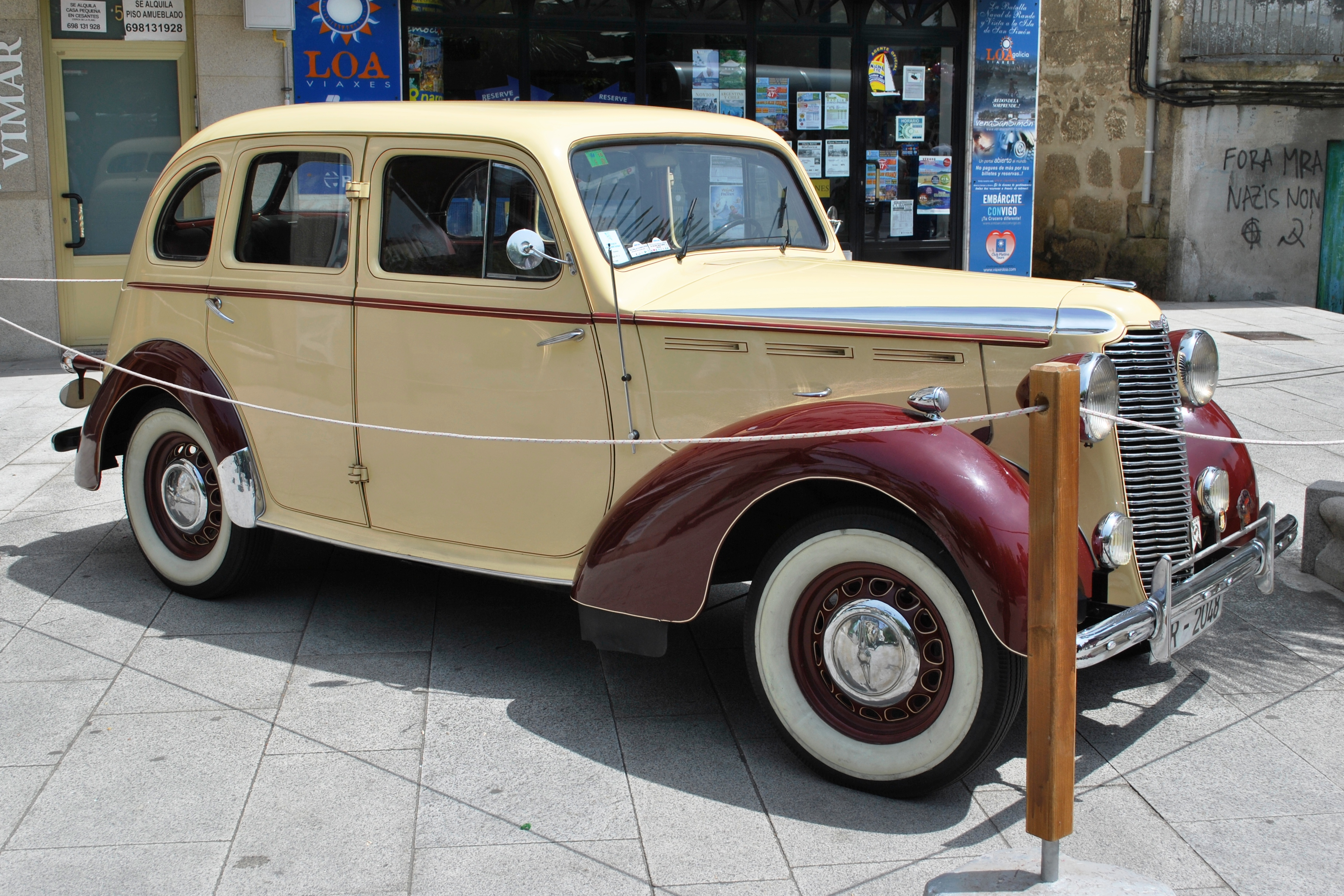 Véxase o título e as categorías.